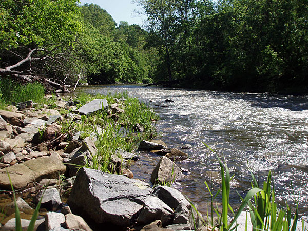 Deer Creek, Maryland, USA.